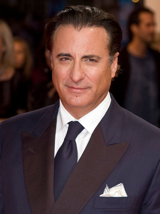 Andy Garcia Deauville 2009